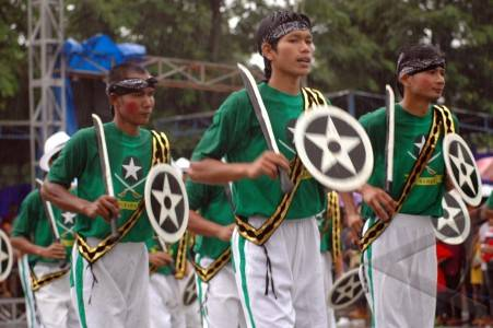 tarian Kubrosiswo adalah tarian khas Sleman, Yogyakarta yang bercirikan prajurit keraton dan diikuti secara massal.